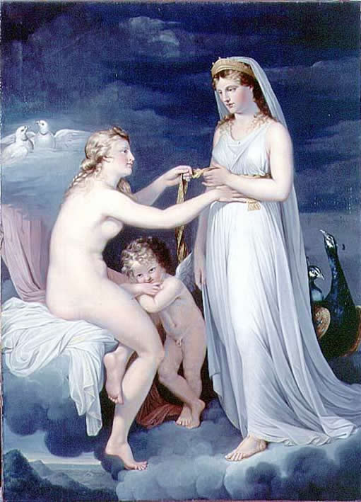 198.1 × 146.1 cm